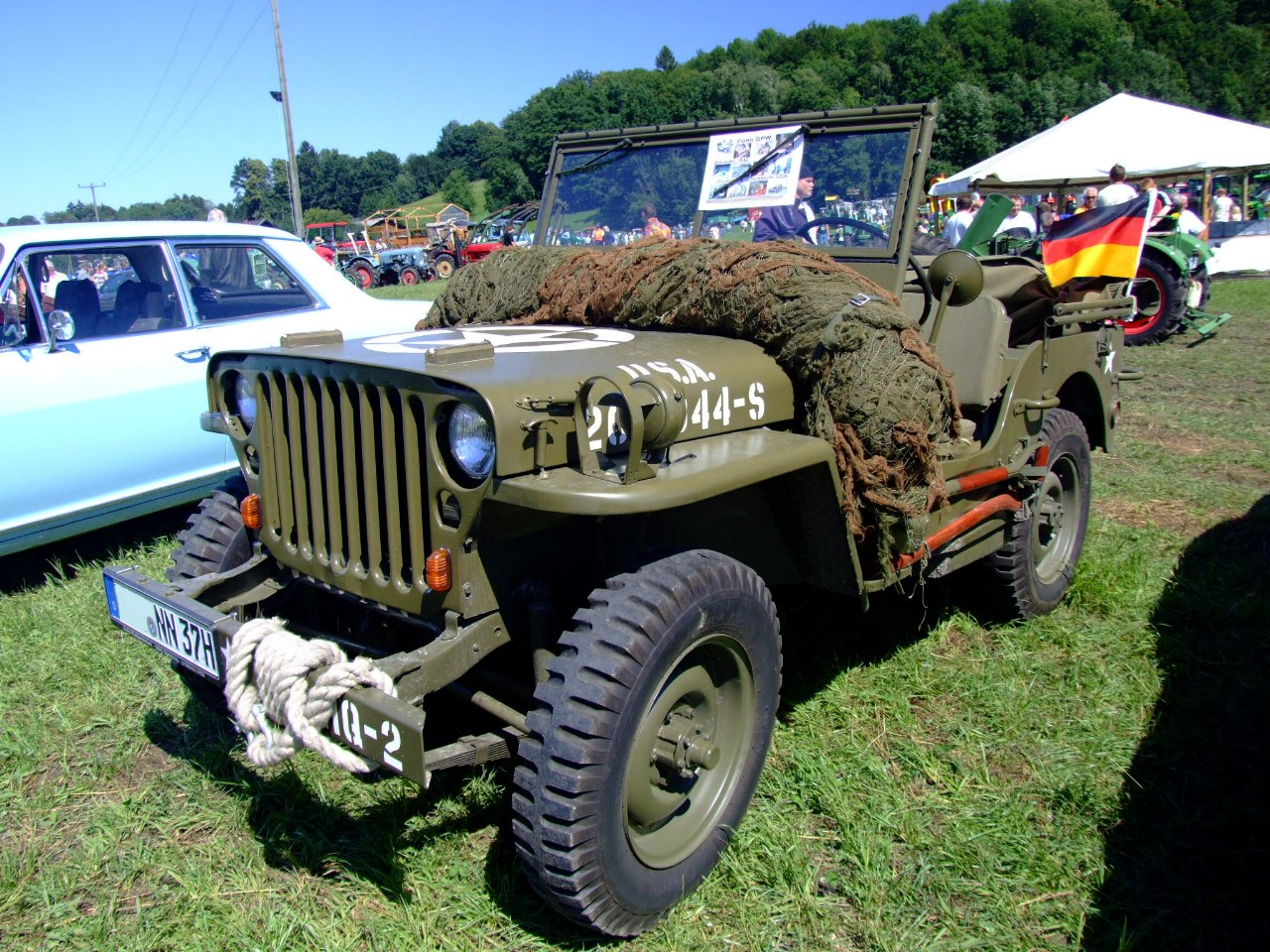 Ford GPW 2200ccm60PS 1942